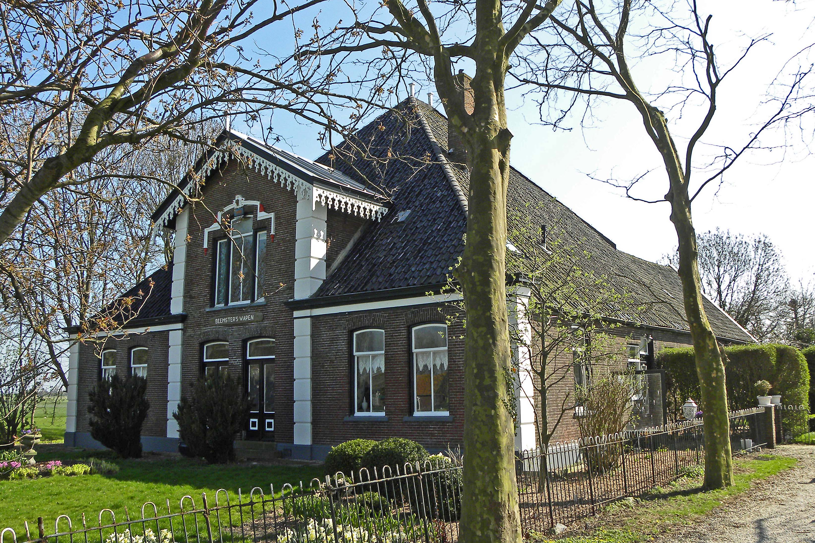 Stolphoeve "Beemster Wapen"